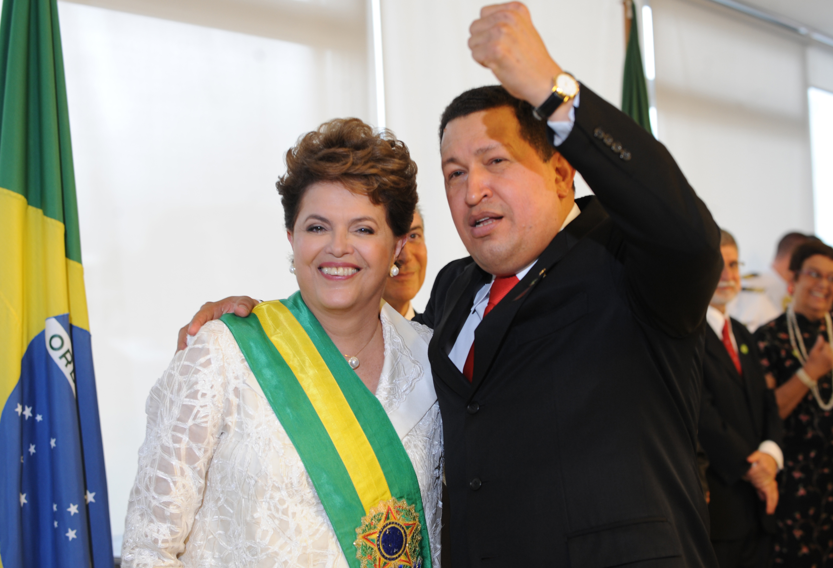 Dilma Rousseff, presidenta do Brasil, e Hugo Chávez, presidente da Venezuela. Brasília, 1º de janeiro de 2011.